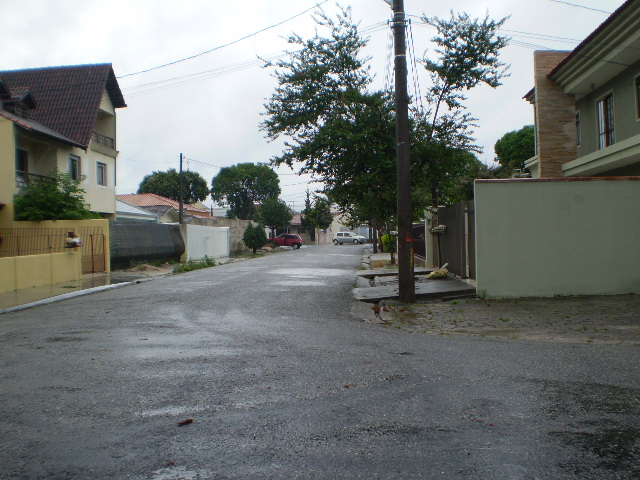 Rua 15 de Outrubro em Curitiba